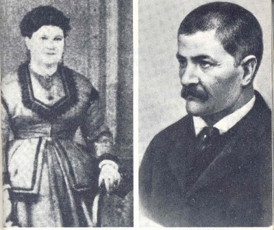 foto dei genitori di Santa Gemma Galgani di Lucca